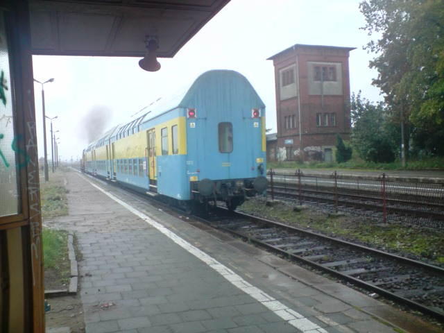 Bipa odjeżdza ze stacji Czersk